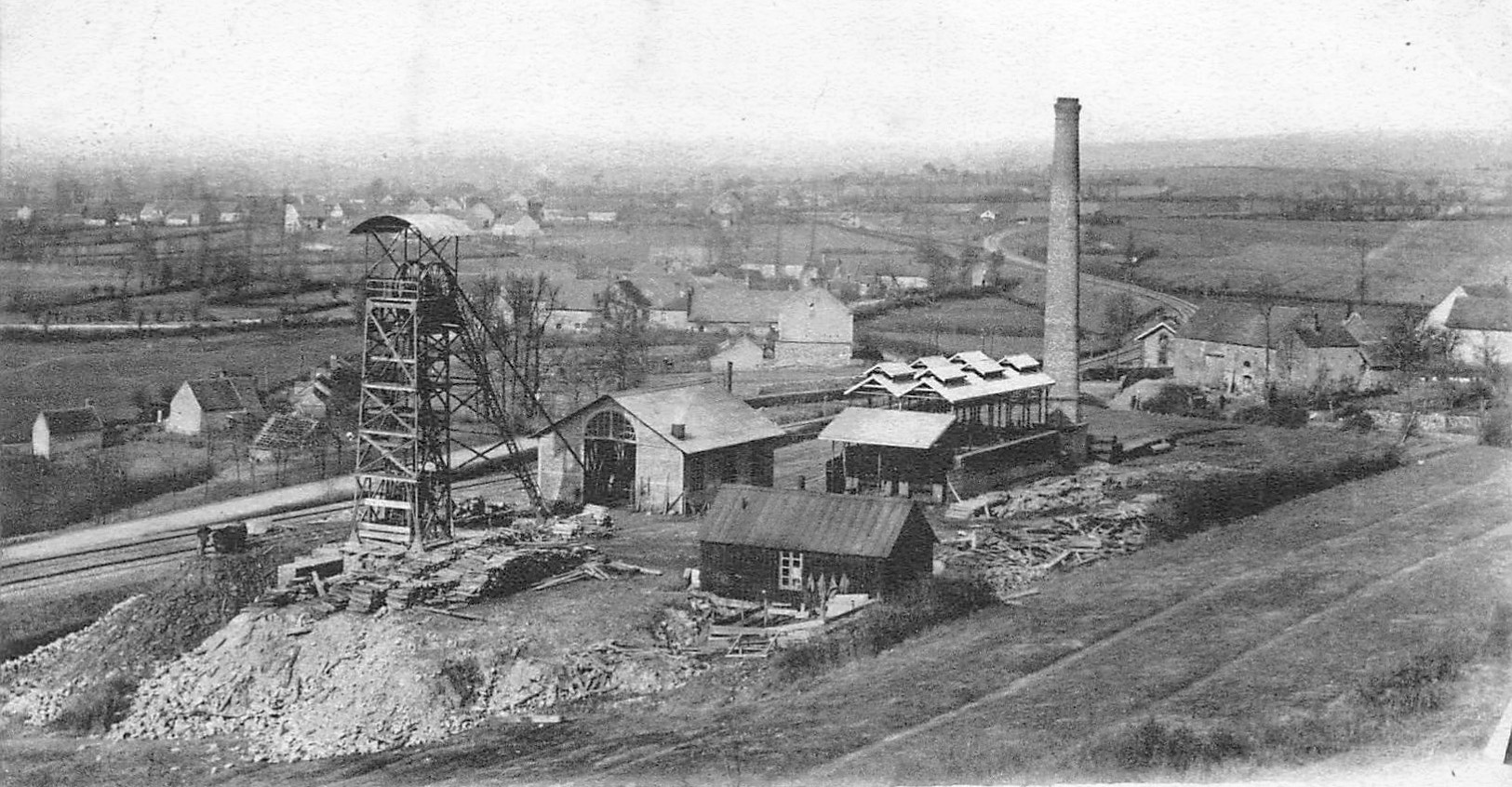 Le puits Lestiboudois (Houillères d’Épinac, France).